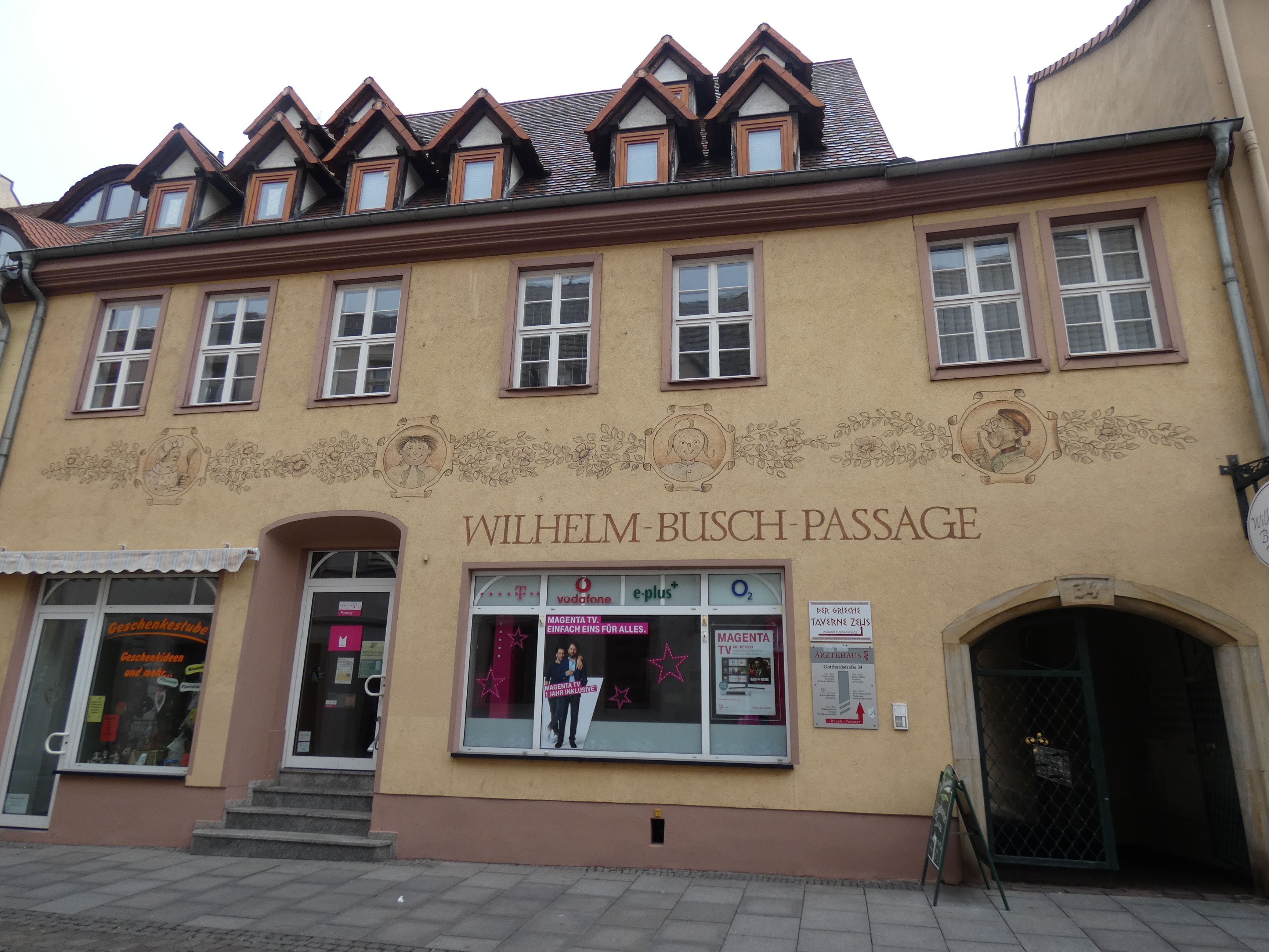 Gotthardstraße 34, Eingang zur Wilhelm-Busch-Passage, Merseburg